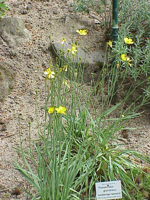 Species: Ranunculus gramineus Family: Ranunculaceae Image No. 2